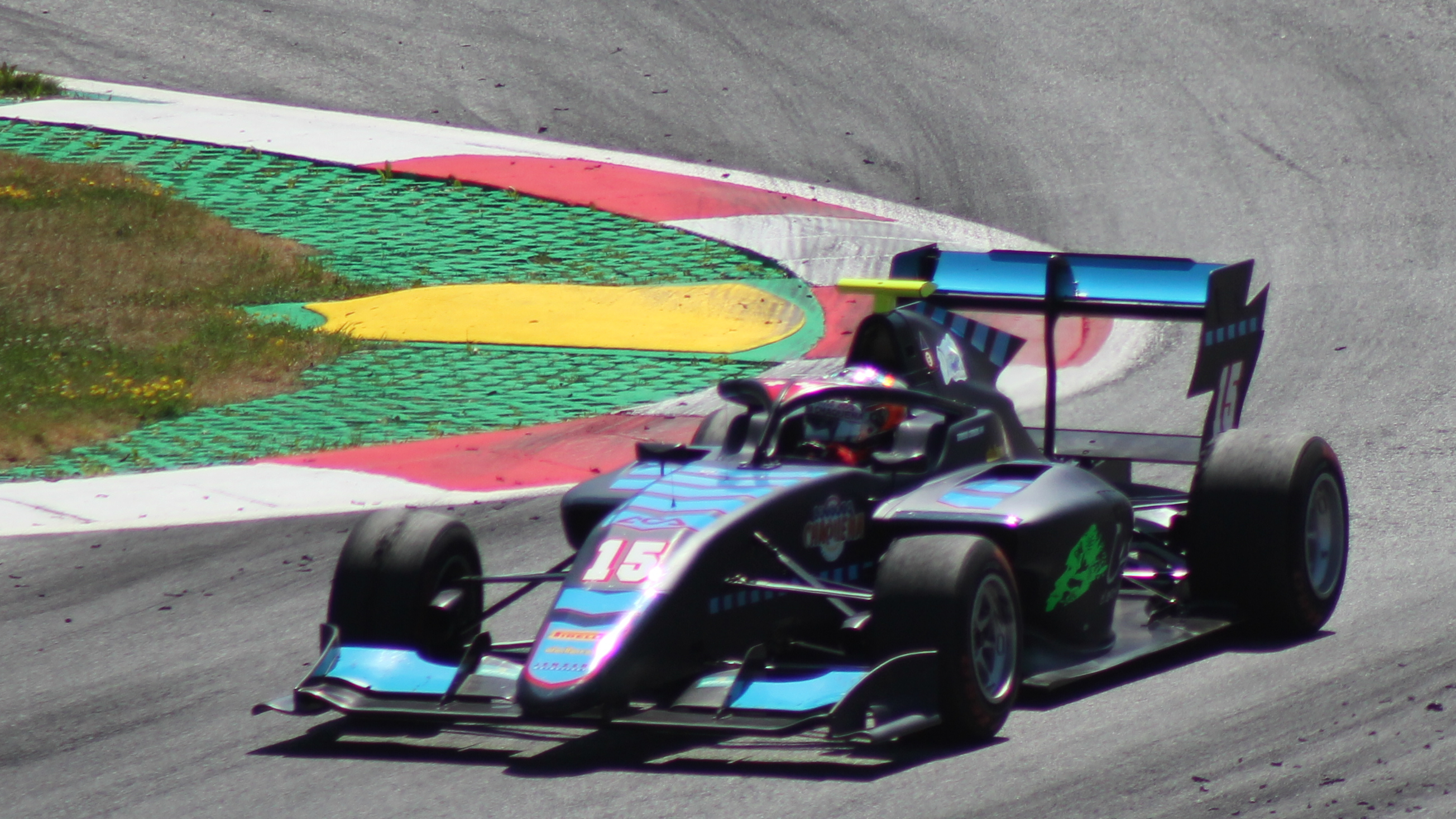 Carrara beim Rennwochenende in Österreich 2019